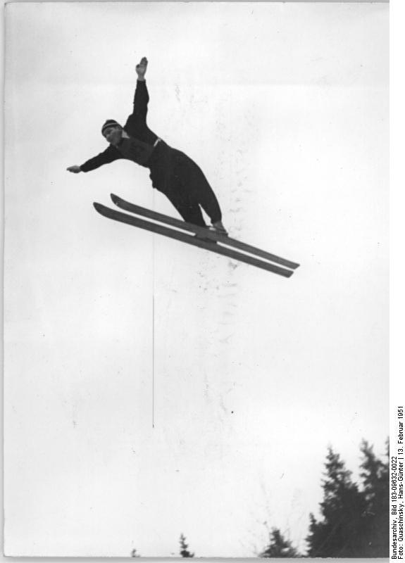 Illus Quaschinsky 13.2.51 Die 2. Wintersportmeisterschaften der Deutschen Demokratischen Republik vom 11.-18.2.51 in Oberhof UBz: Beim Spezialsprunglauf-Schauspringen: Jan Kula (VR Polen) beim Sprung.